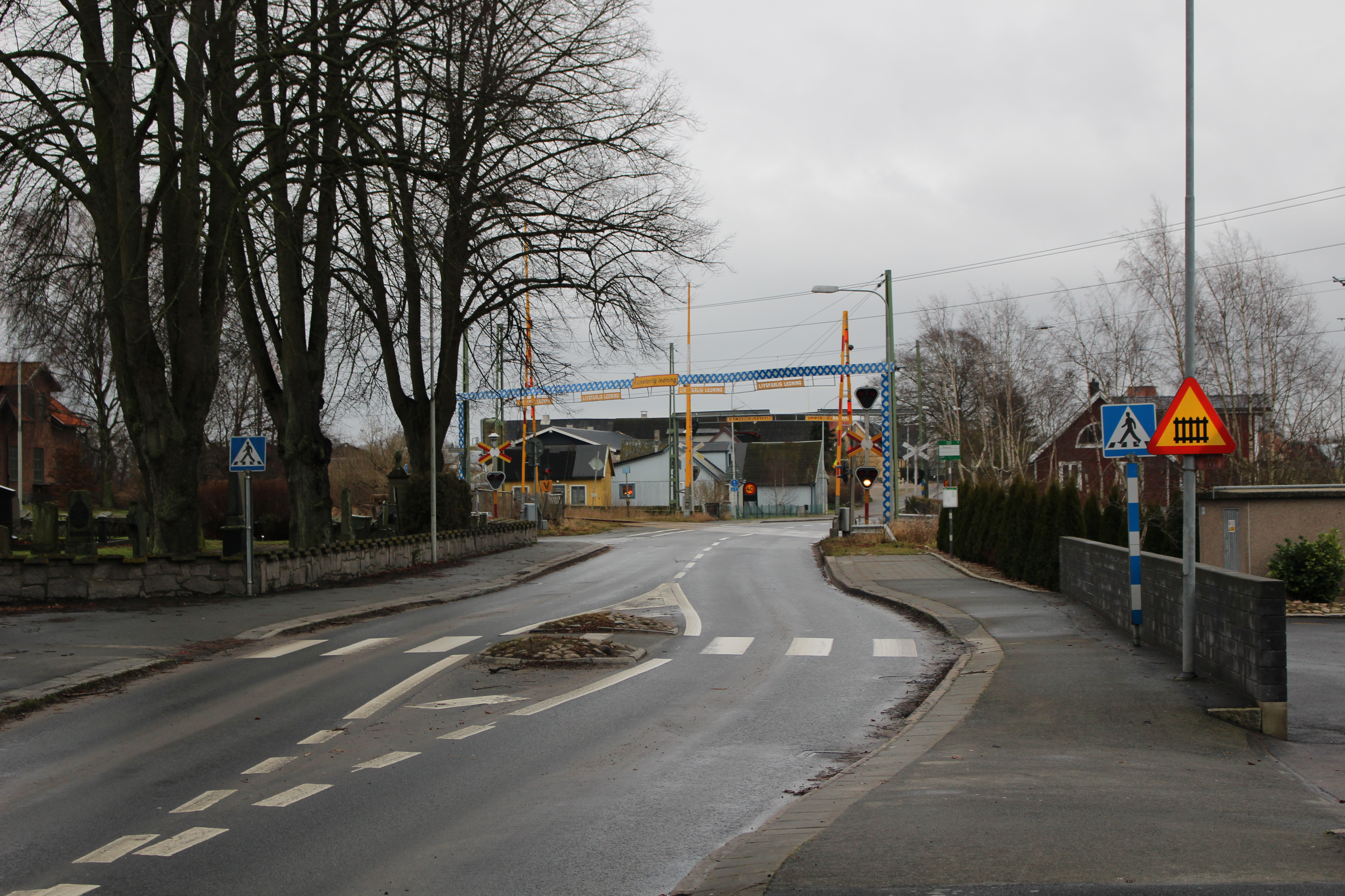 Länsväg 118 där den går genom järnvägsövergången i Nosaby.